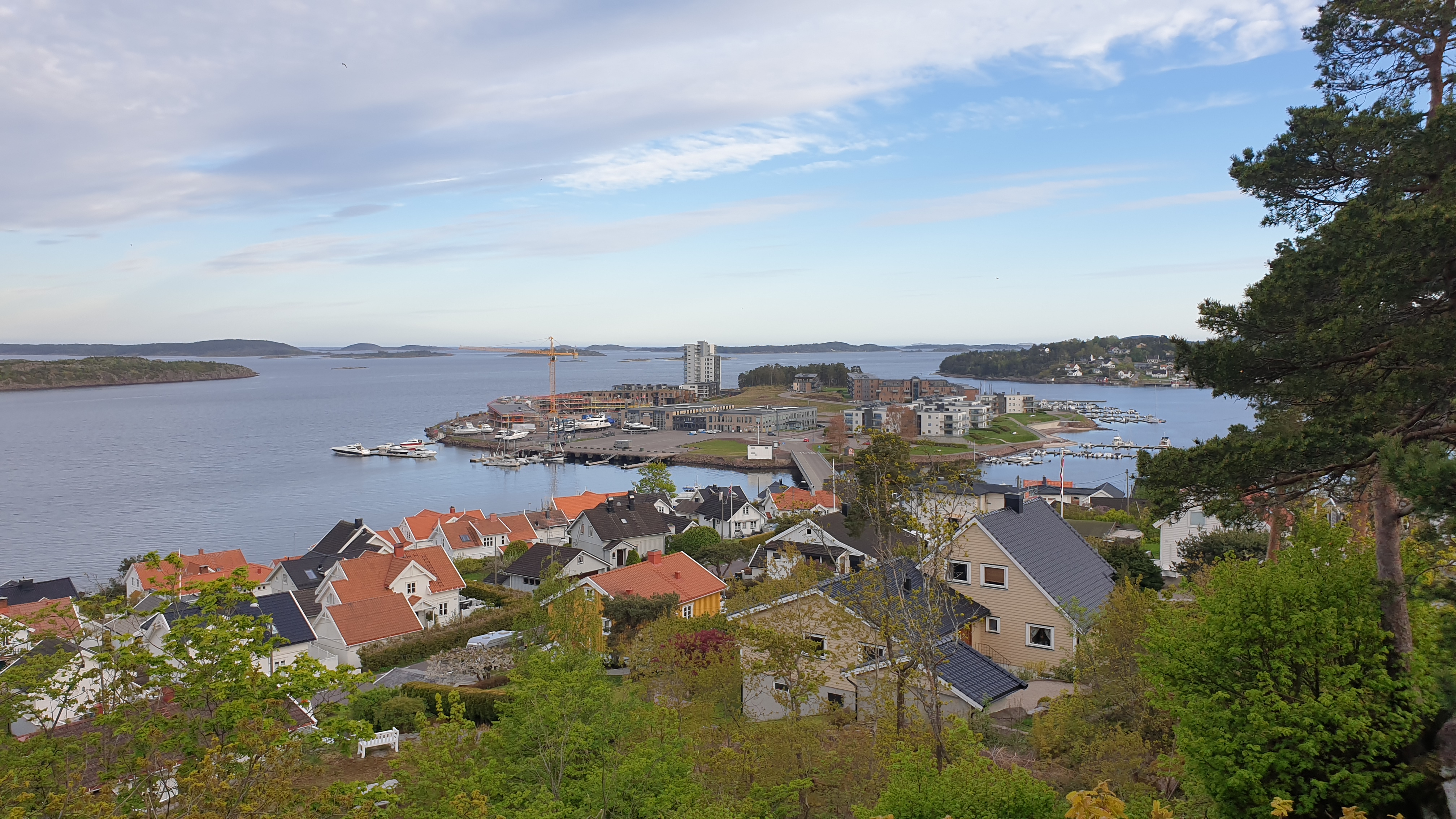 Jarlsø, øy i Tønsberg